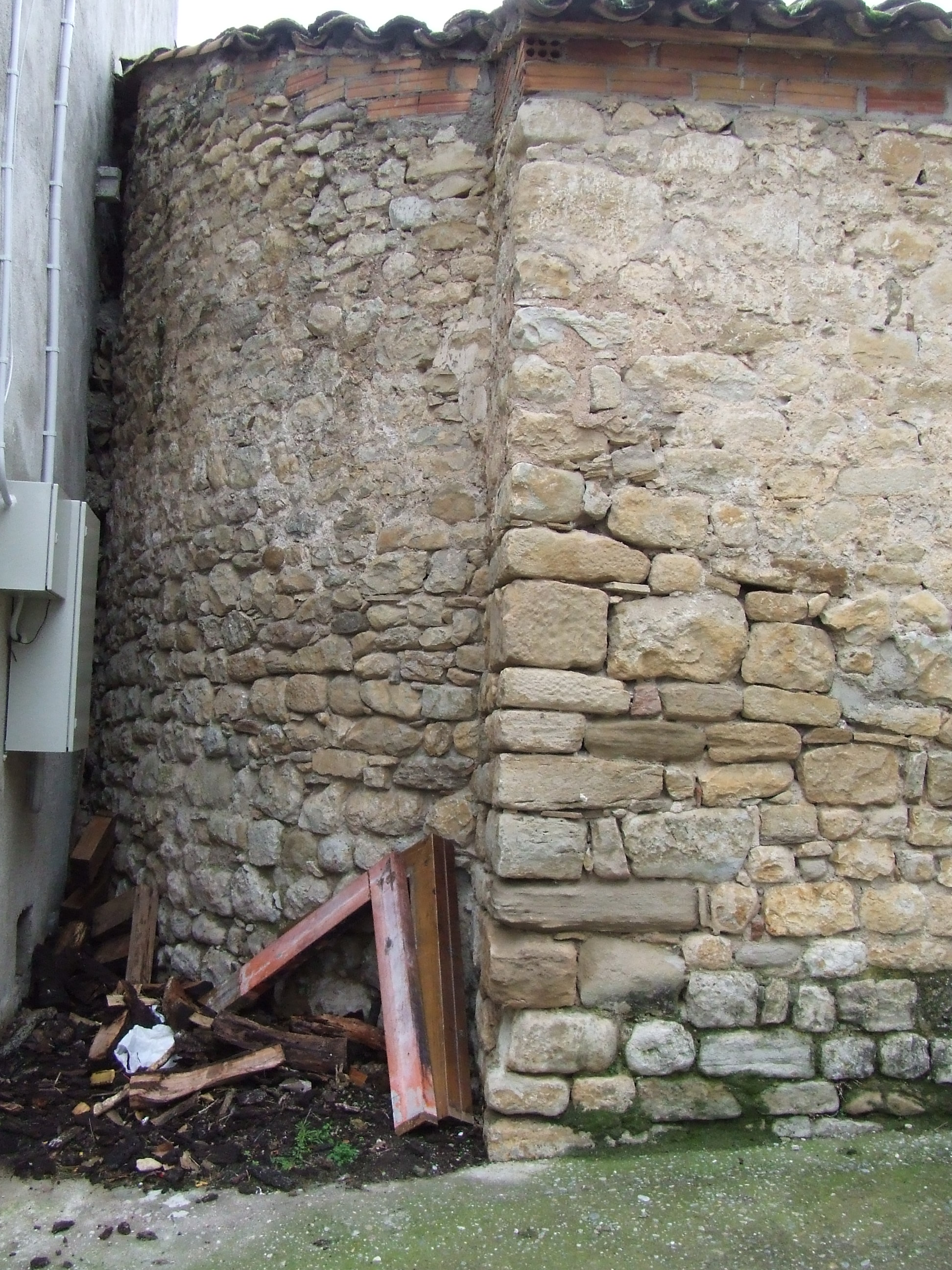 Detall de l'absis de l'església de Cellers (Guàrdia de Tremp, Castell de Mur, Pallars Jussà)